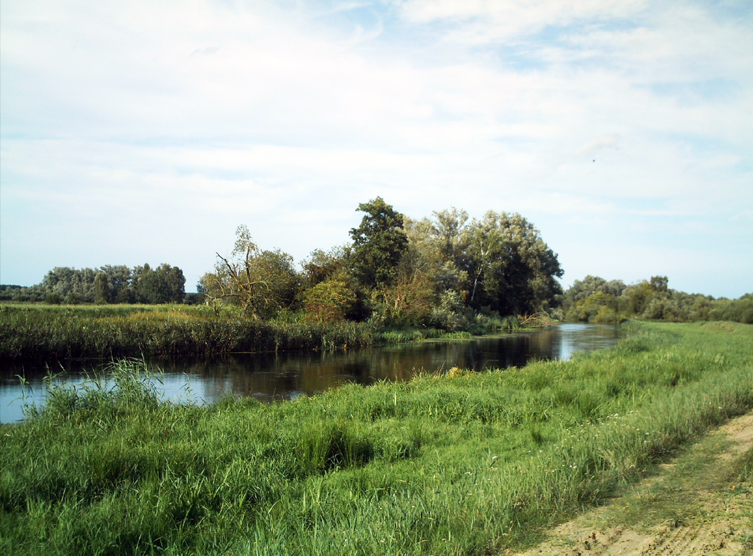 die Uecker am Schlossberg